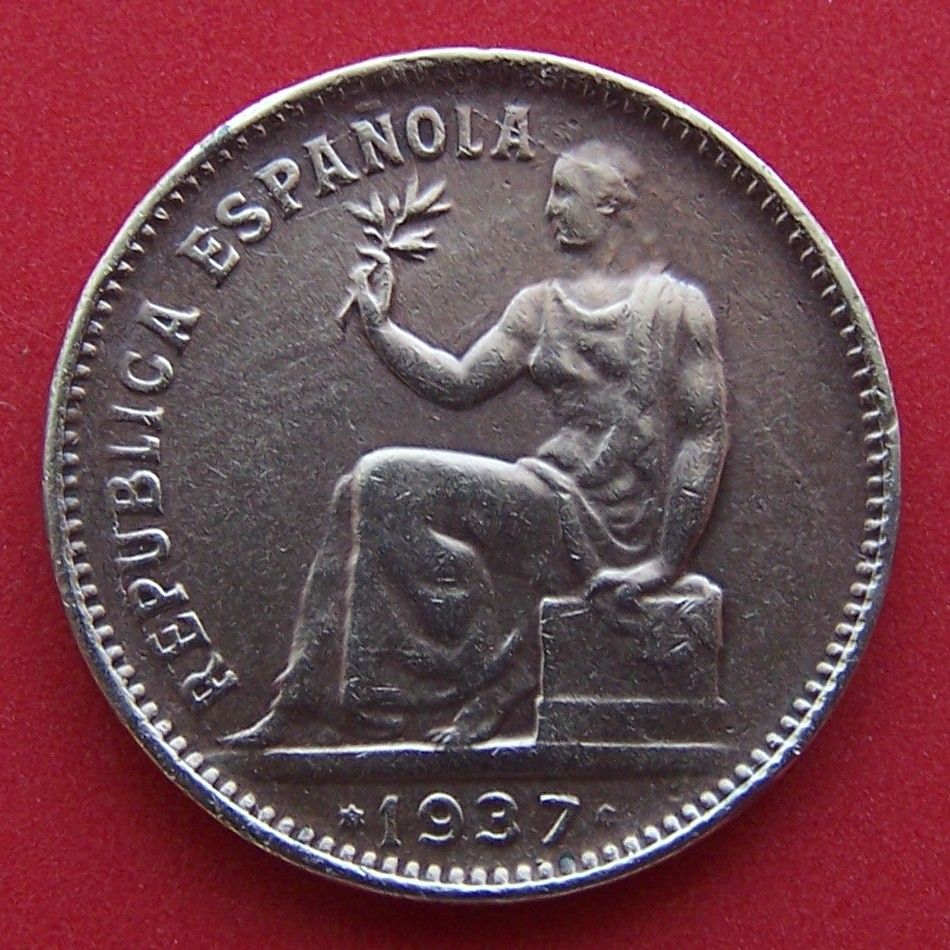 Anverso de la moneda de 50 céntimos 1937, República Española